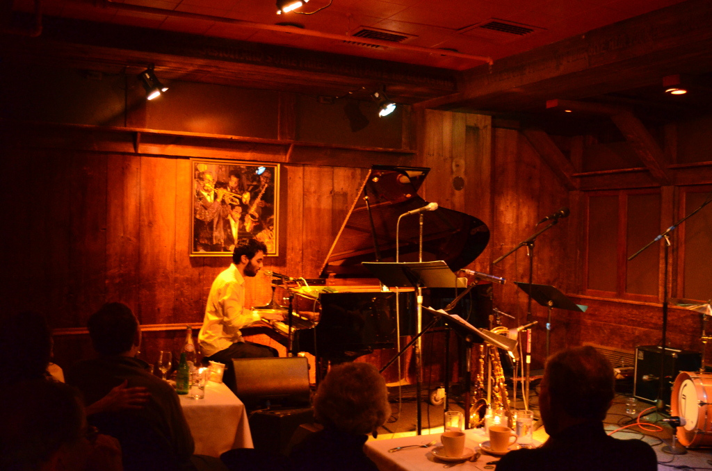 Выступления Тиграна Хамасяна в клубе (Филадельфия, США)